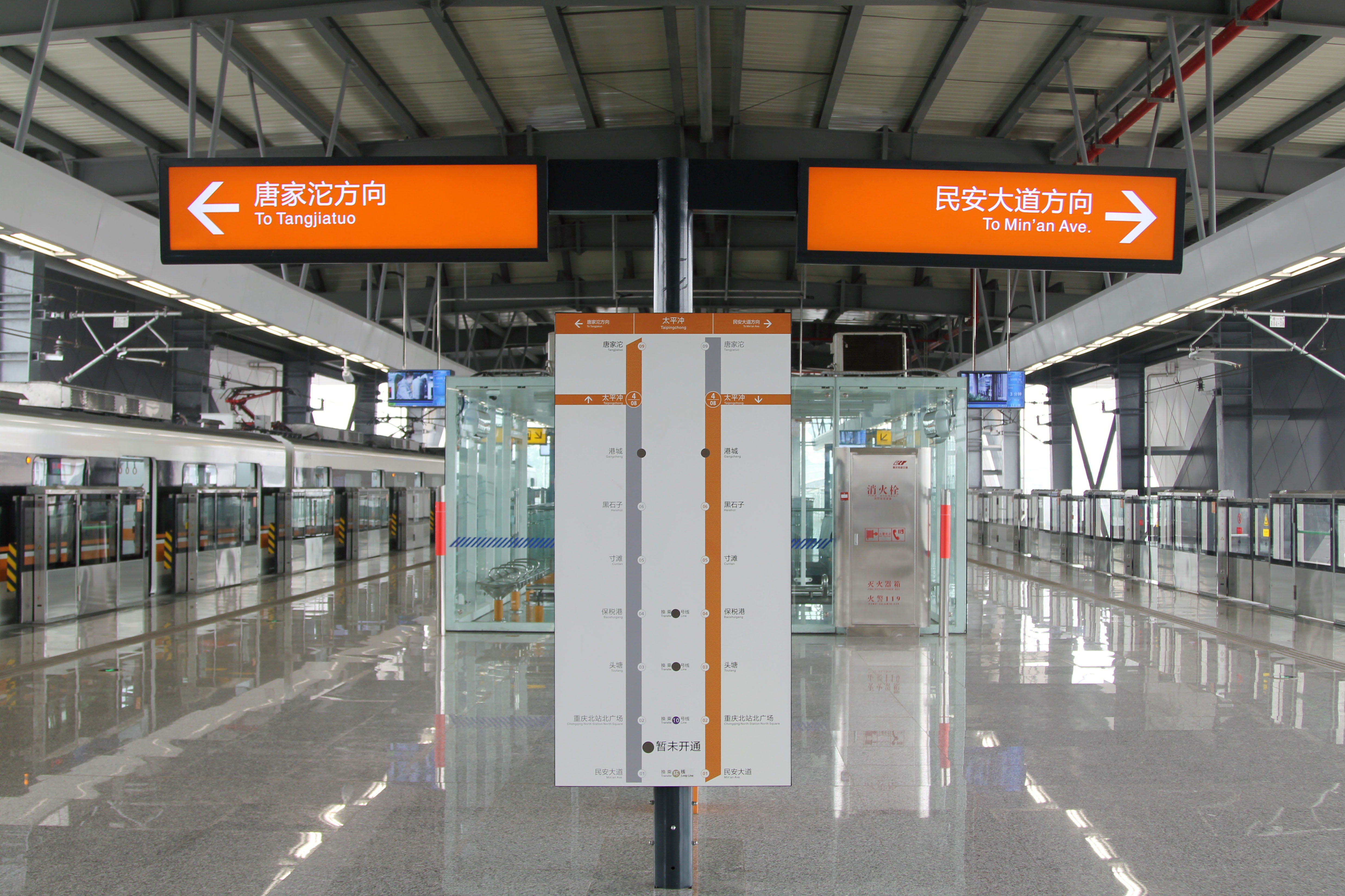 中文（中国大陆）: 4号线太平冲站站台